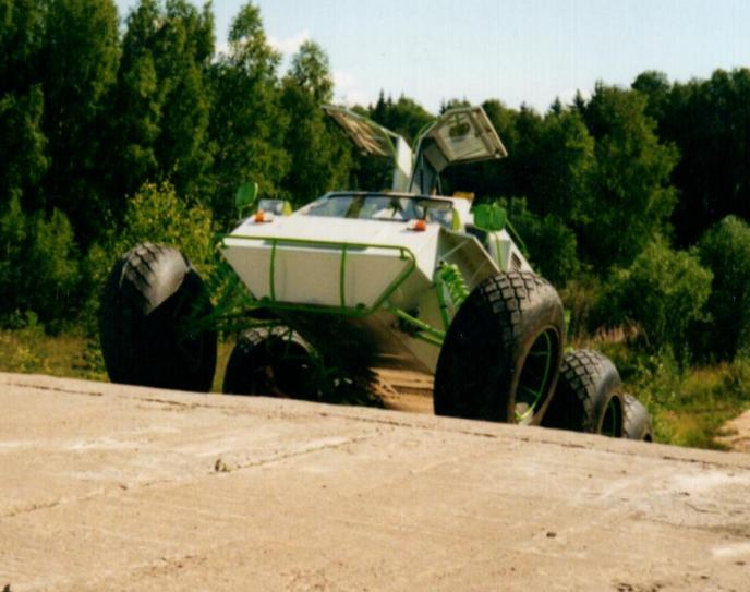 Арктика — вездеход-амфибия на шинах сверхнизкого давления, производился ассоциацией «Арктиктранс» с 1990 по 2004г.